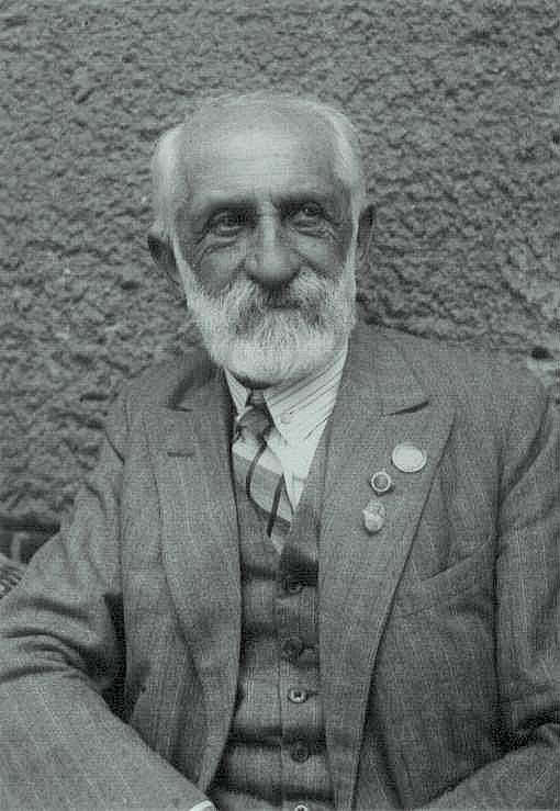 Karol Zaleski (1856-1941)